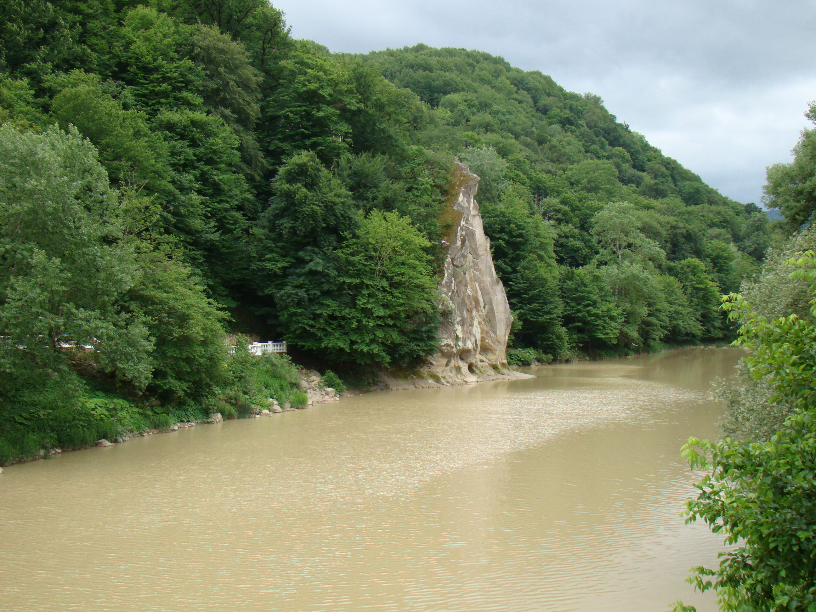 Река Псекупс. Город Горячий Ключ, Краснодарский край, Россия